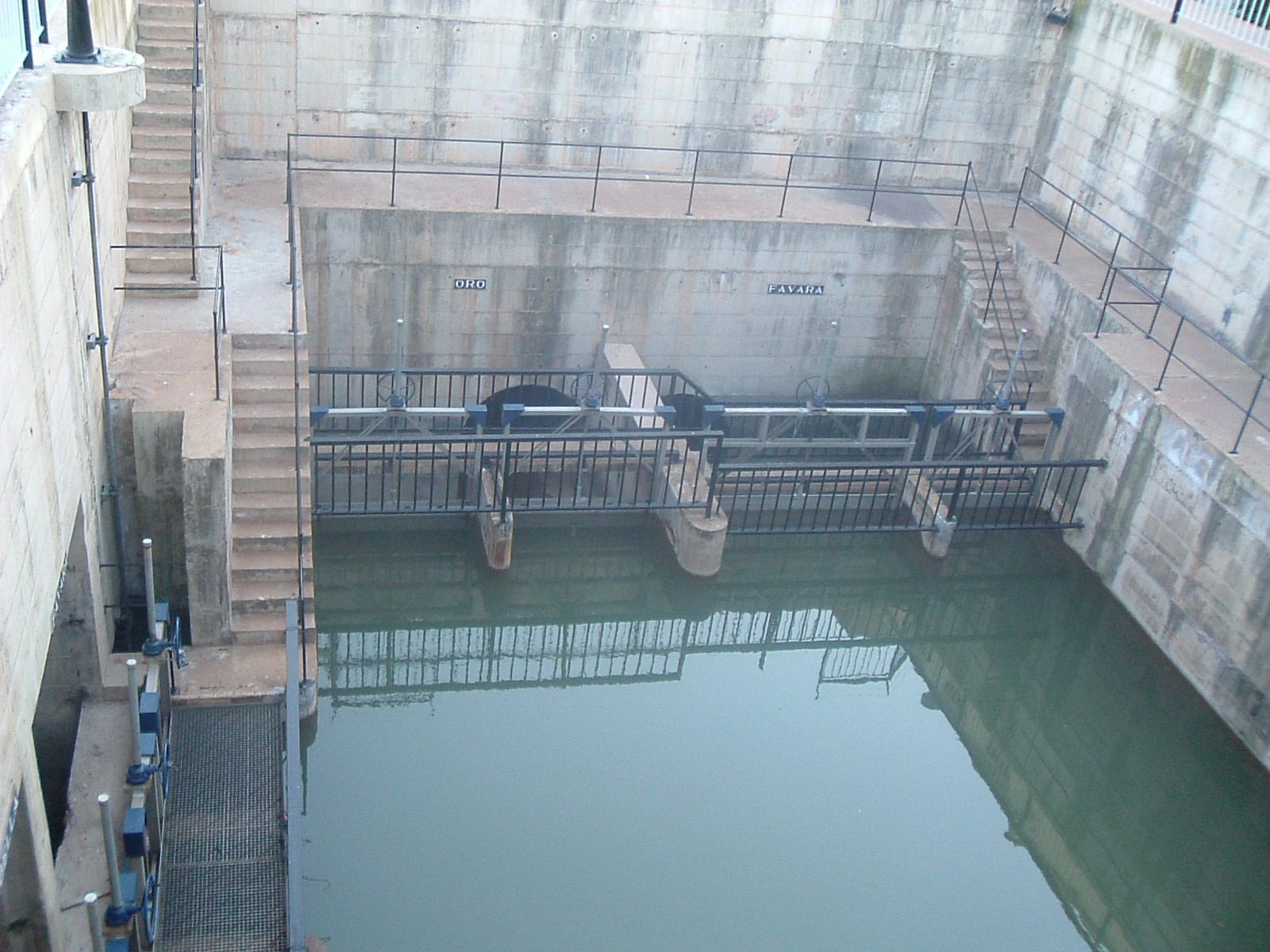 Tomas de las acequias de Favara y Oro en el azud del repartiment